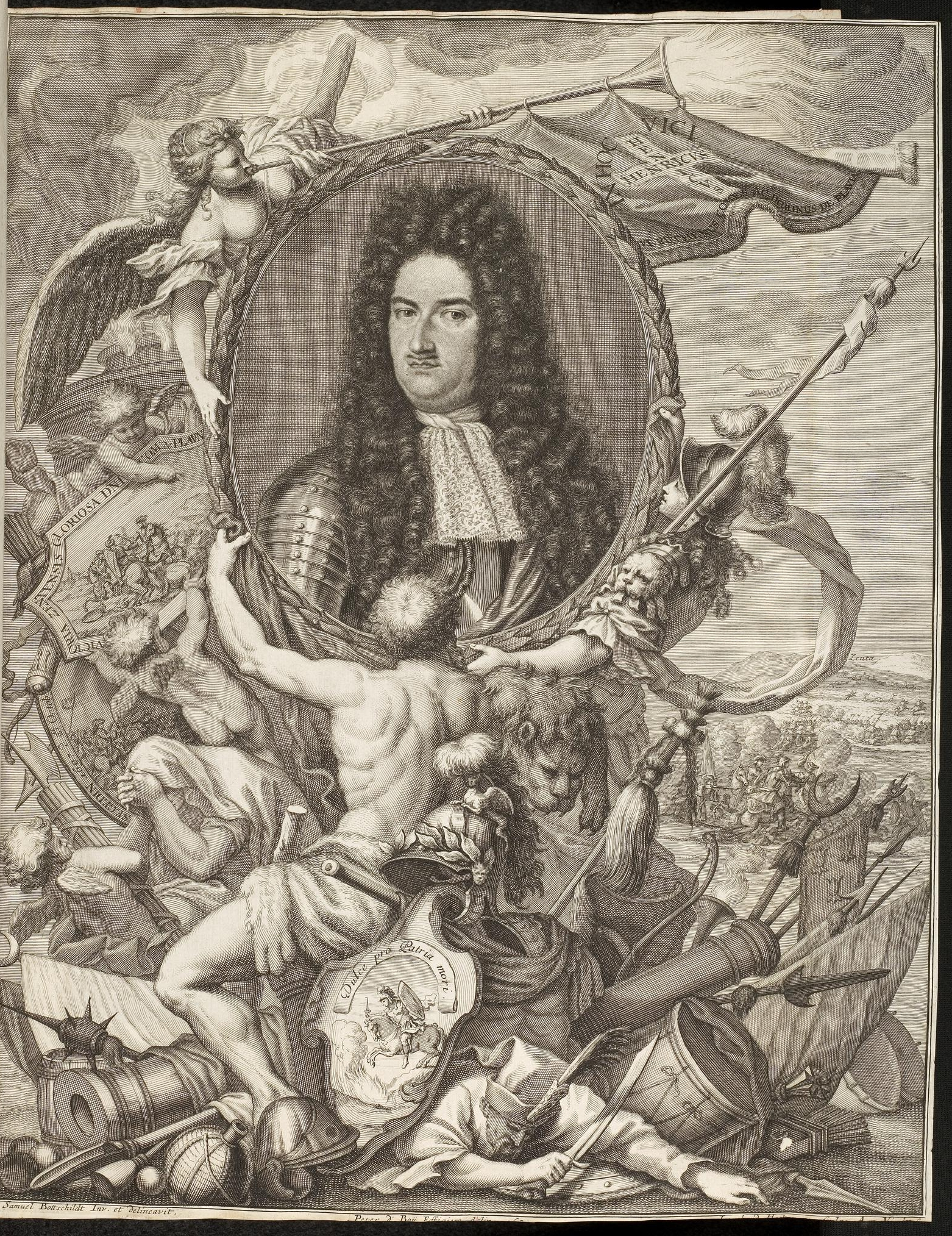 Grafik aus dem Klebeband Nr. 1 der Fürstlich Waldeckschen Hofbibliothek Arolsen. Heinrich VI. Reuß-Obergreiz, Graf Reuß zu Obergreiz und kursächsischer Generalfeldmarschall; Schlacht bei Zenta. (Heinrich VI. Reuß-Obergreiz starb am 11. Oktober 1697 an den Verletzungen, die er sich in der Schlacht bei Zenta zugezogen hatte.)